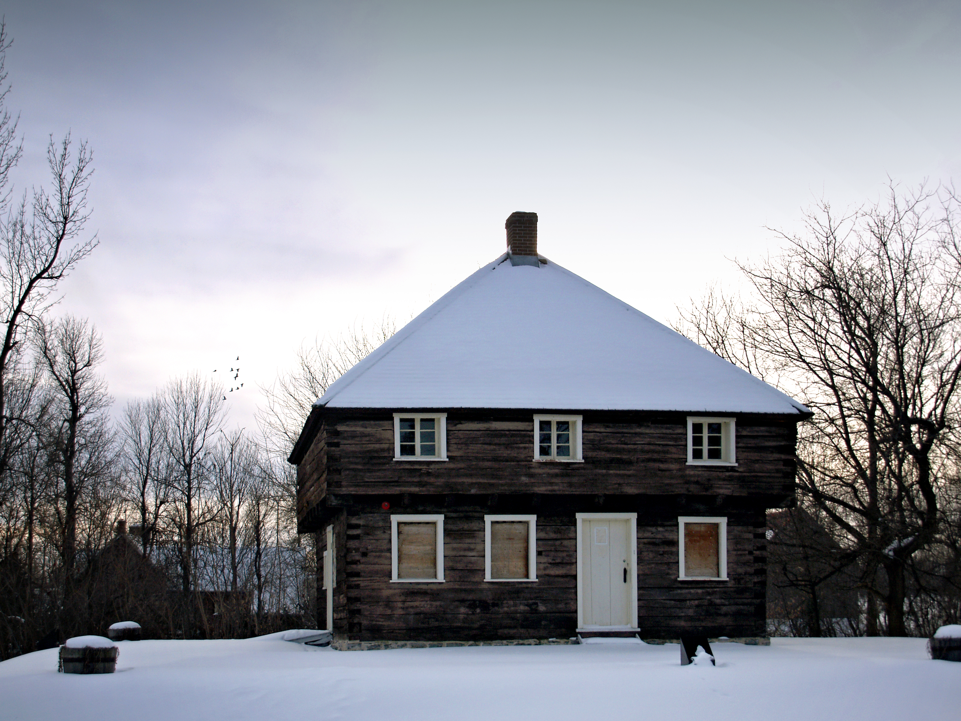 Saint-Paul-de-l'Île-aux-Noix (Québec) - Blockhaus Rivière-Lacolle